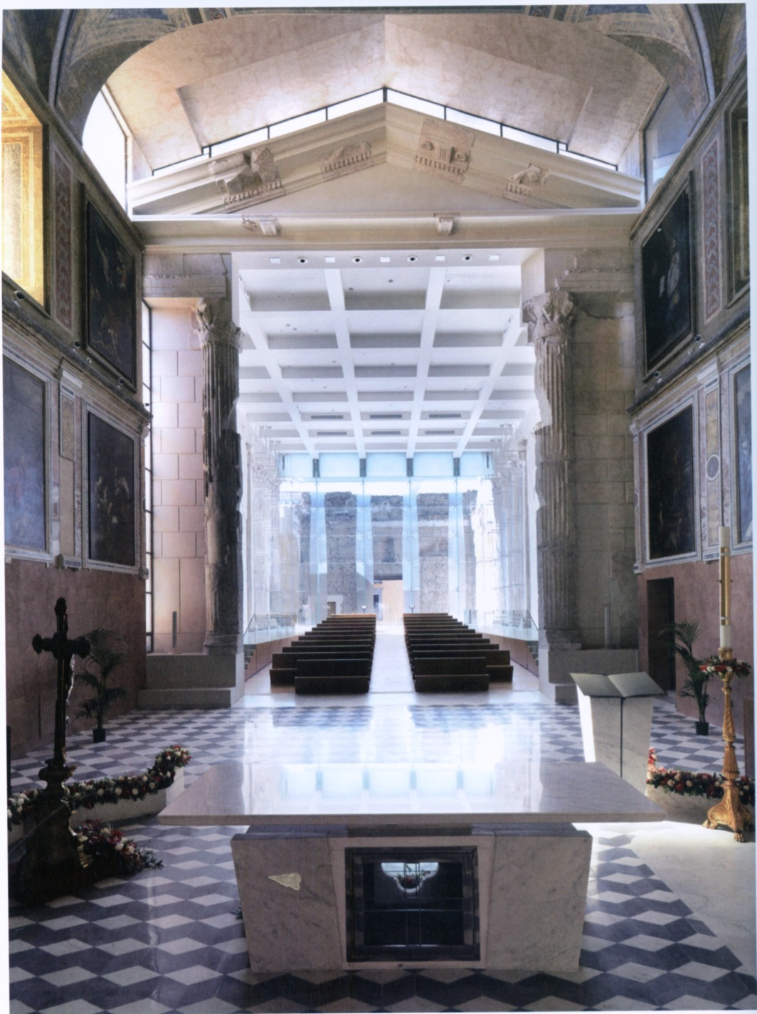 Tempio romano e Basilica Cattedrale di San Procolo martire di Pozzuoli